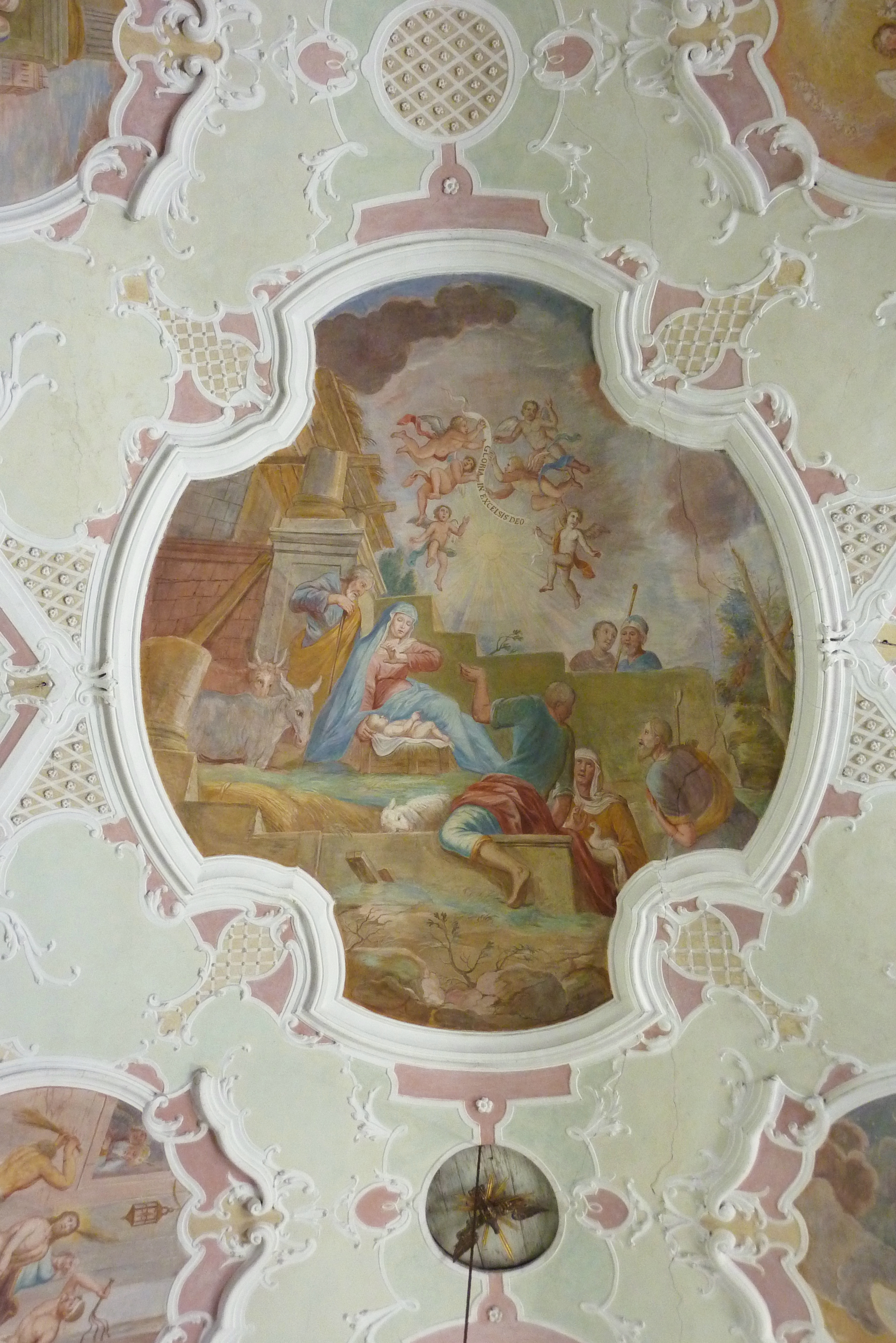 Katholische Pfarrkirche Mariä Himmelfahrt in Hochaltingen, einem Ortsteil von Fremdingen im Landkreis Donau-Ries (Bayern), Deckenbilder von 1730, Darstellung (im Langhaus): Geburt Christi